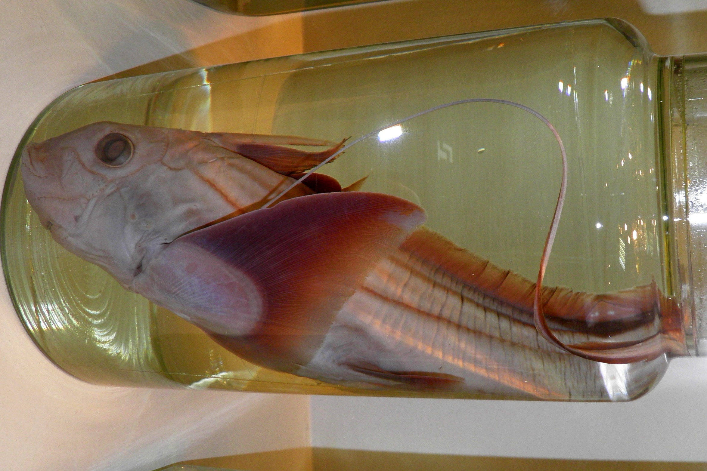 Chimaera phantasma в Научном музее ДВФУ (г. Владивосток)